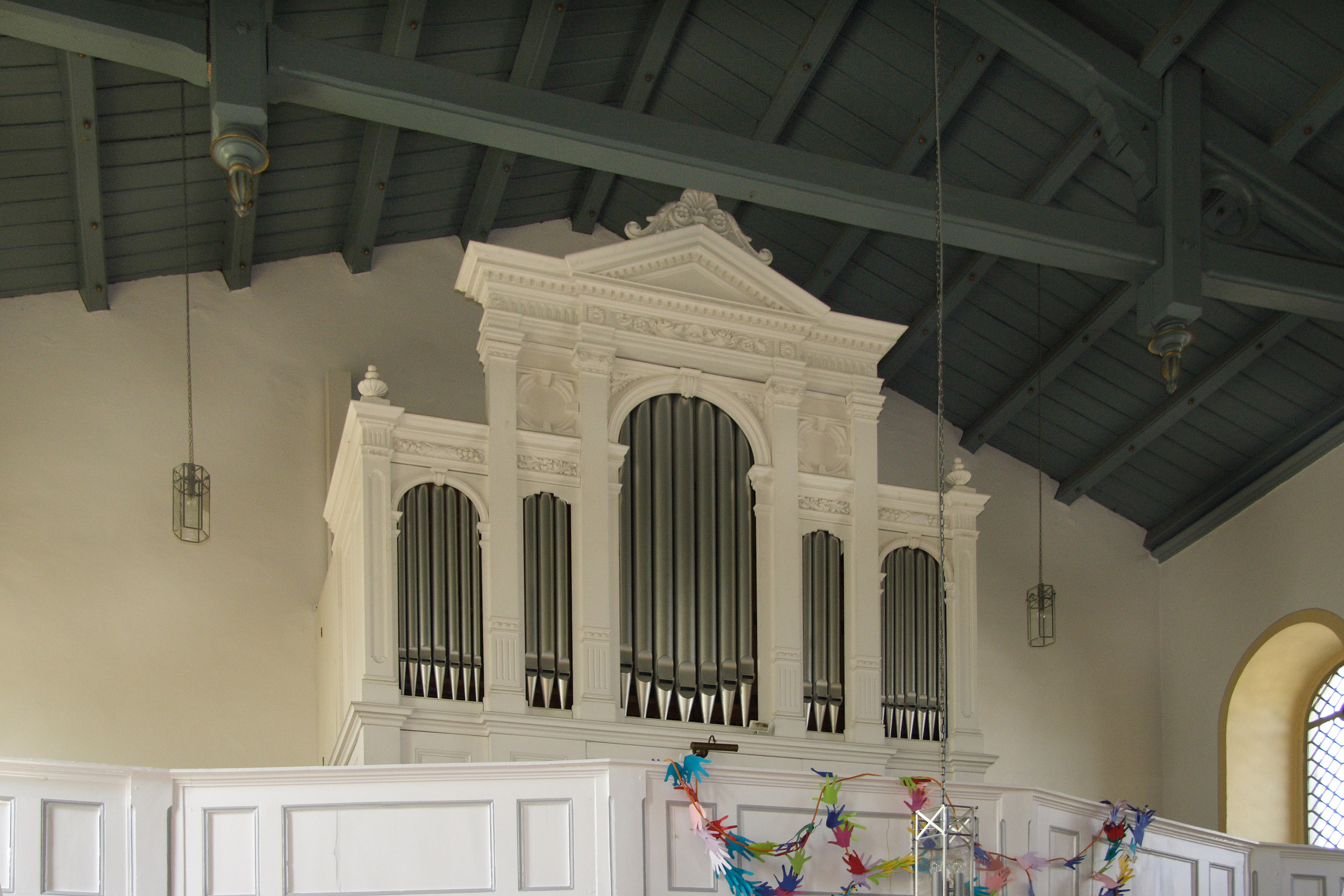 Die Orgelempore in der evangelischen Stadtkirche zu Brilon